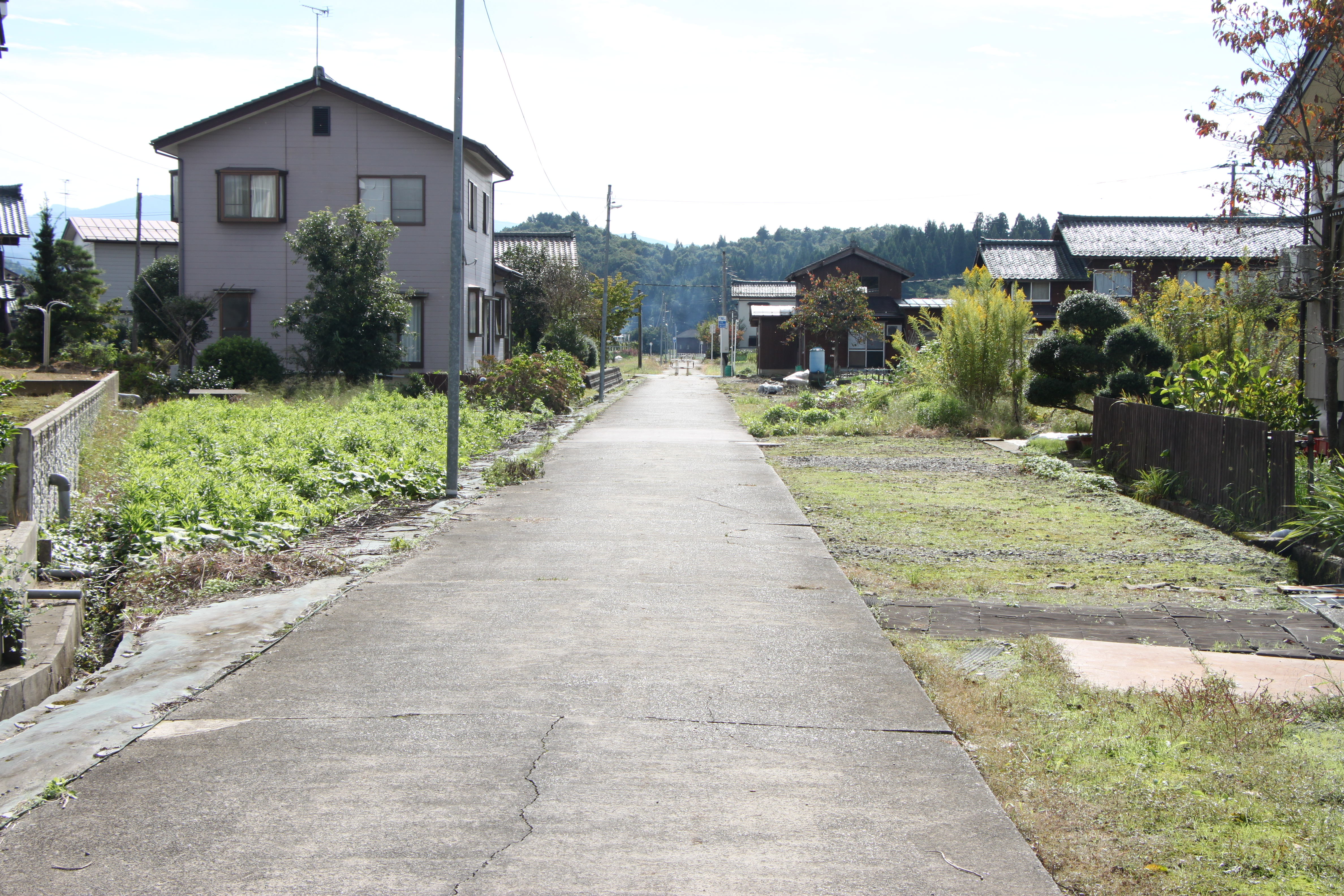 住宅の中の幅広い土地が駅の名残をとどめる。左の住宅の位置に変電所があった。 (2016年10月11日撮影)